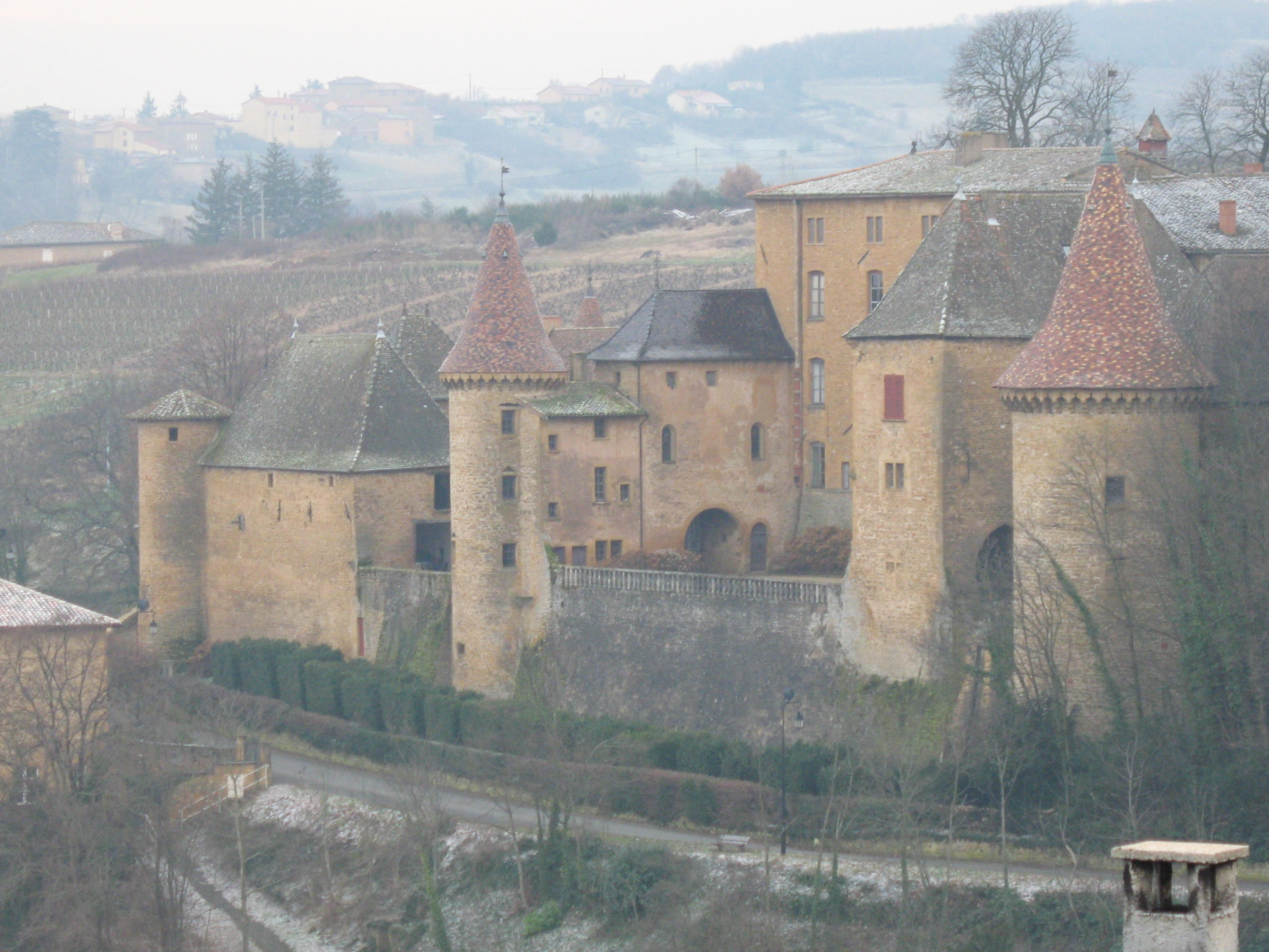 Château de Jarnioux, dans le Rhône